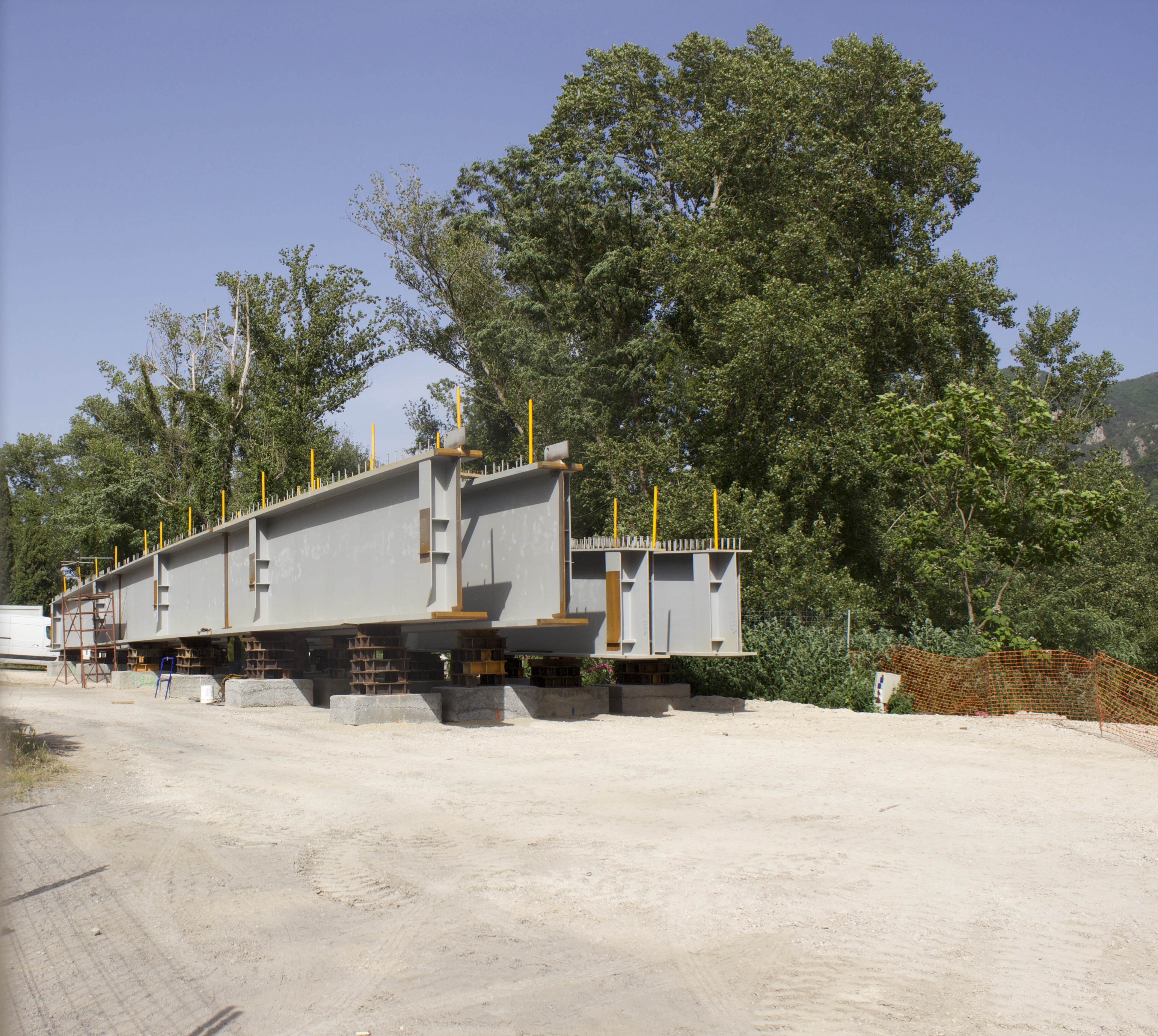 Vue du chantier de reconstruction du pont de Can Bia, à Arles-sur-Tech.